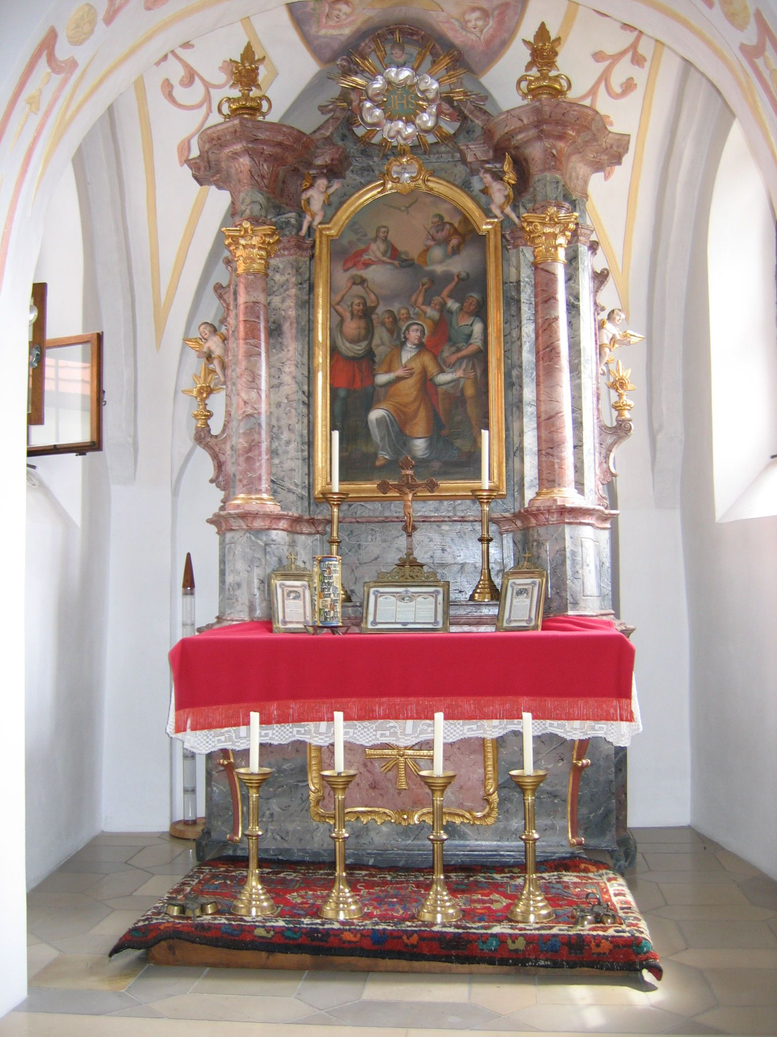 Der Hochaltar mit St. Stephanus in der alten Kirche in Sehensand.